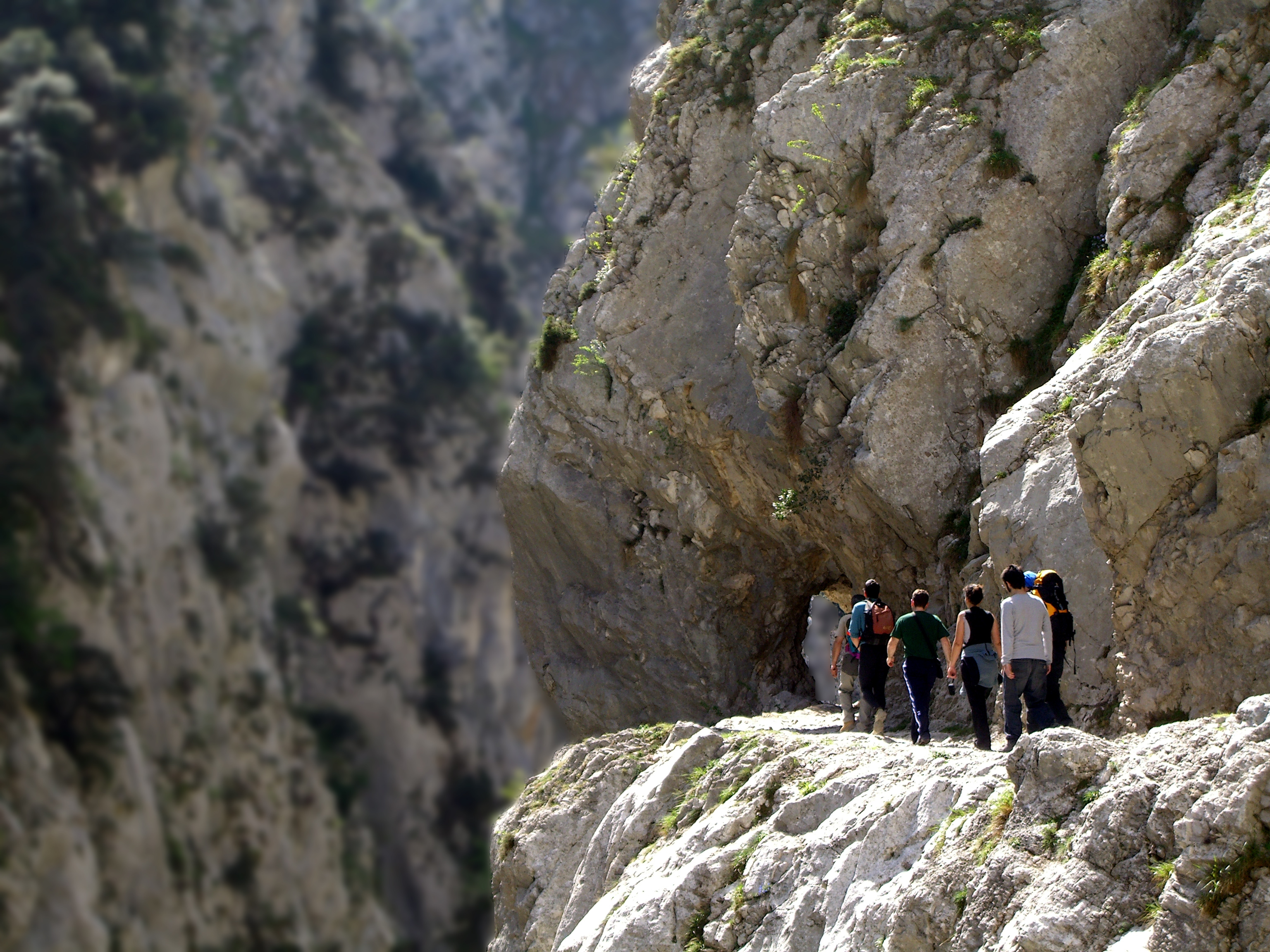 Ruta del Cares, n'Asturies